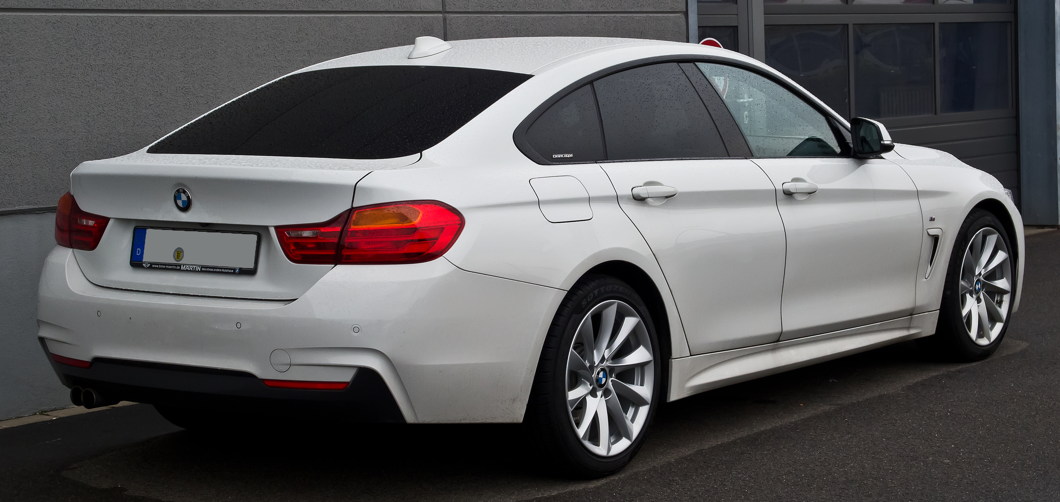 BMW 430d Gran Coupé M Sport (F36)